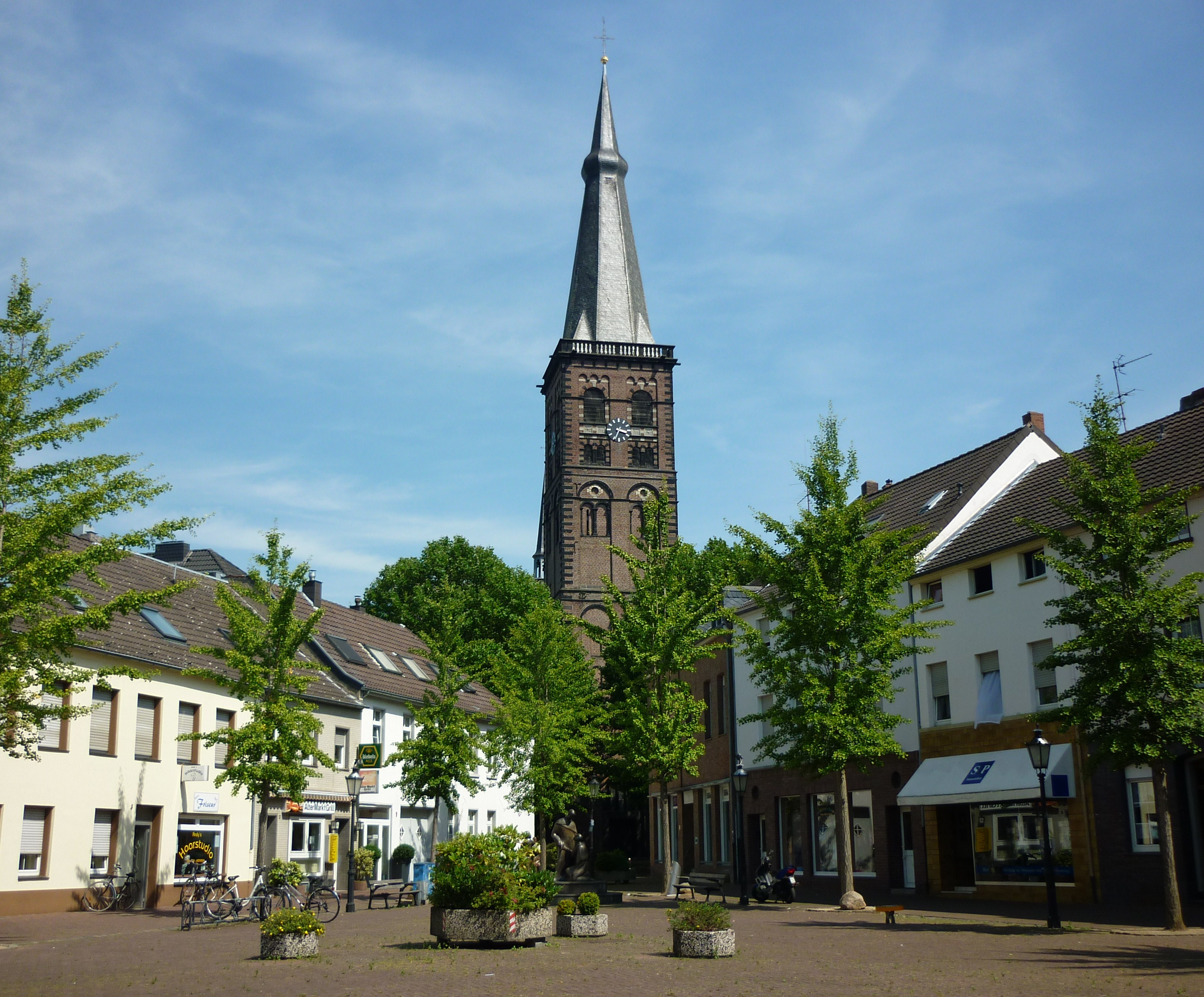 St. Tönis, Alter Markt